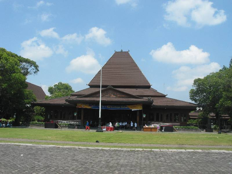 Surakarta City Hall